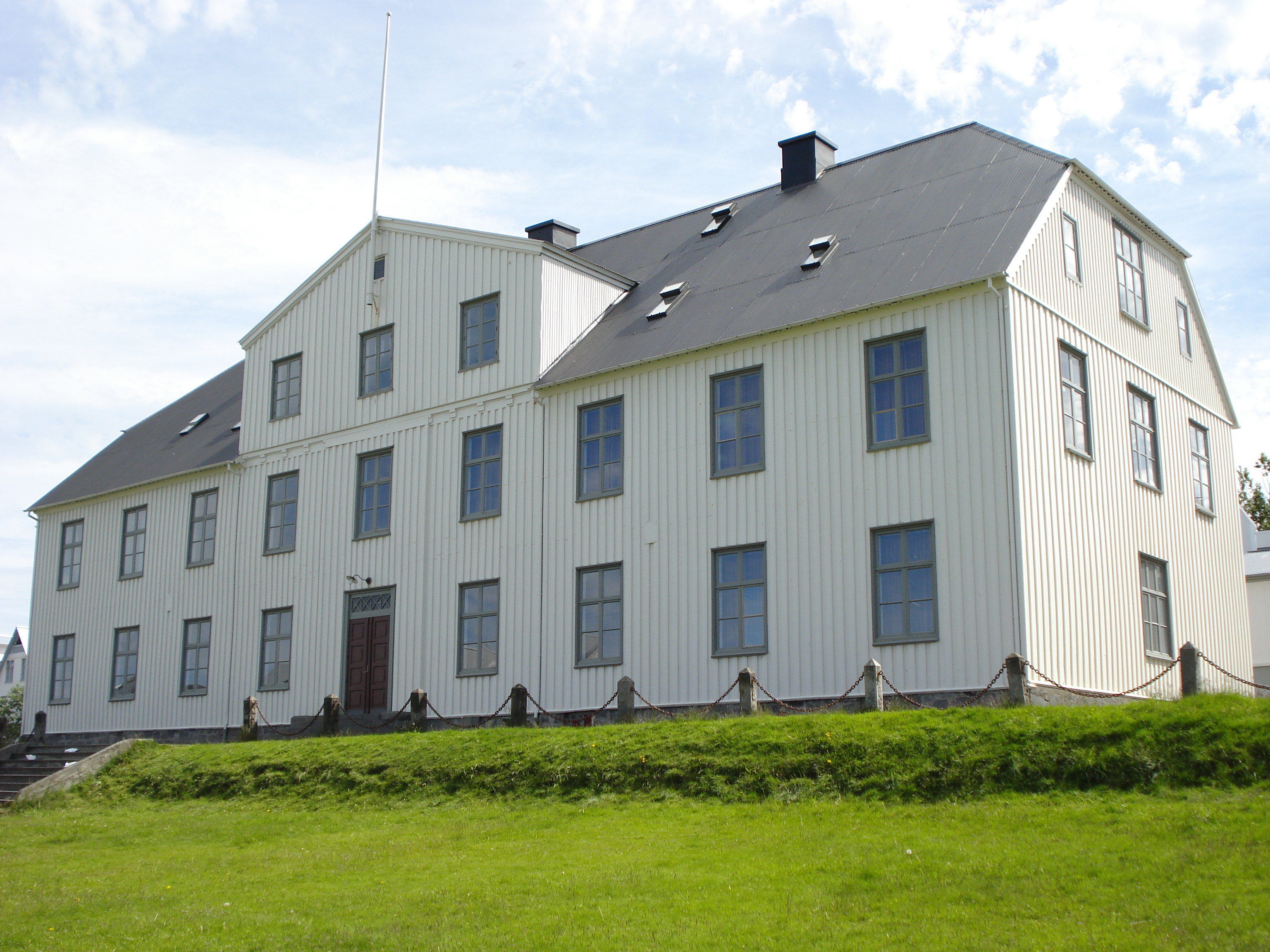 Menntaskóli Reykjavíkur, MR, High School, Iceland